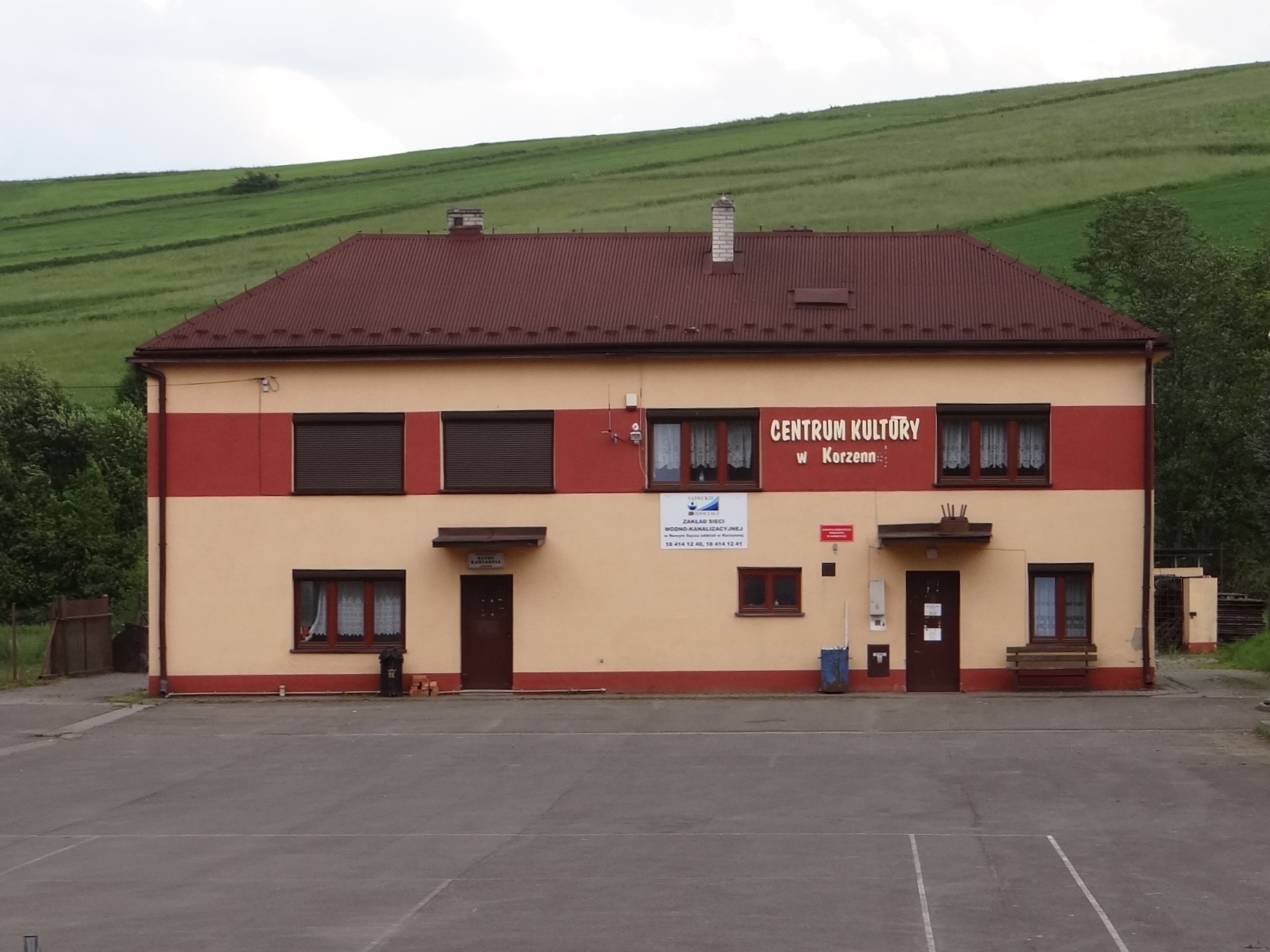 Korzenna, Centrum Kultury